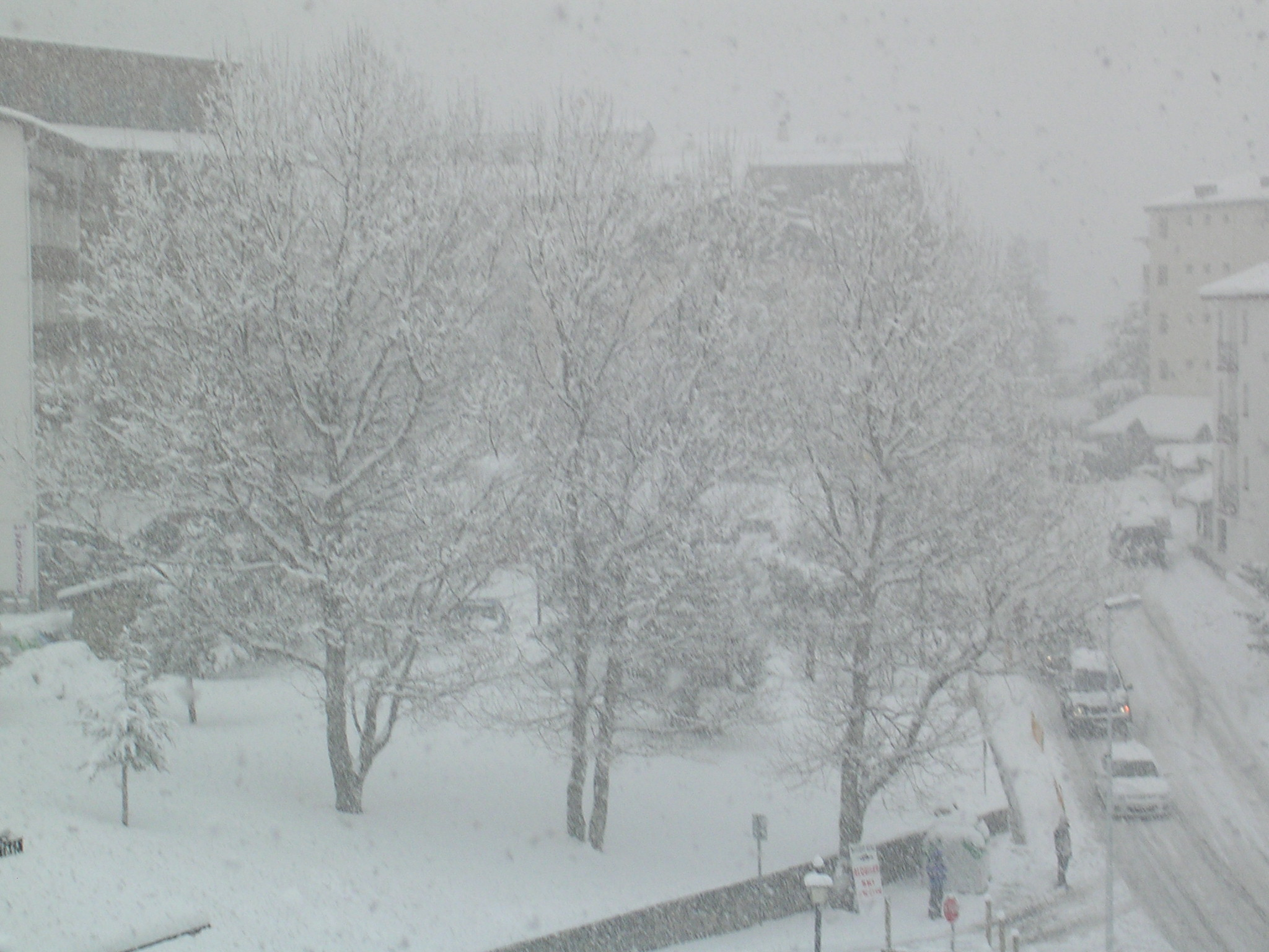 Soy el autor de la instantánea